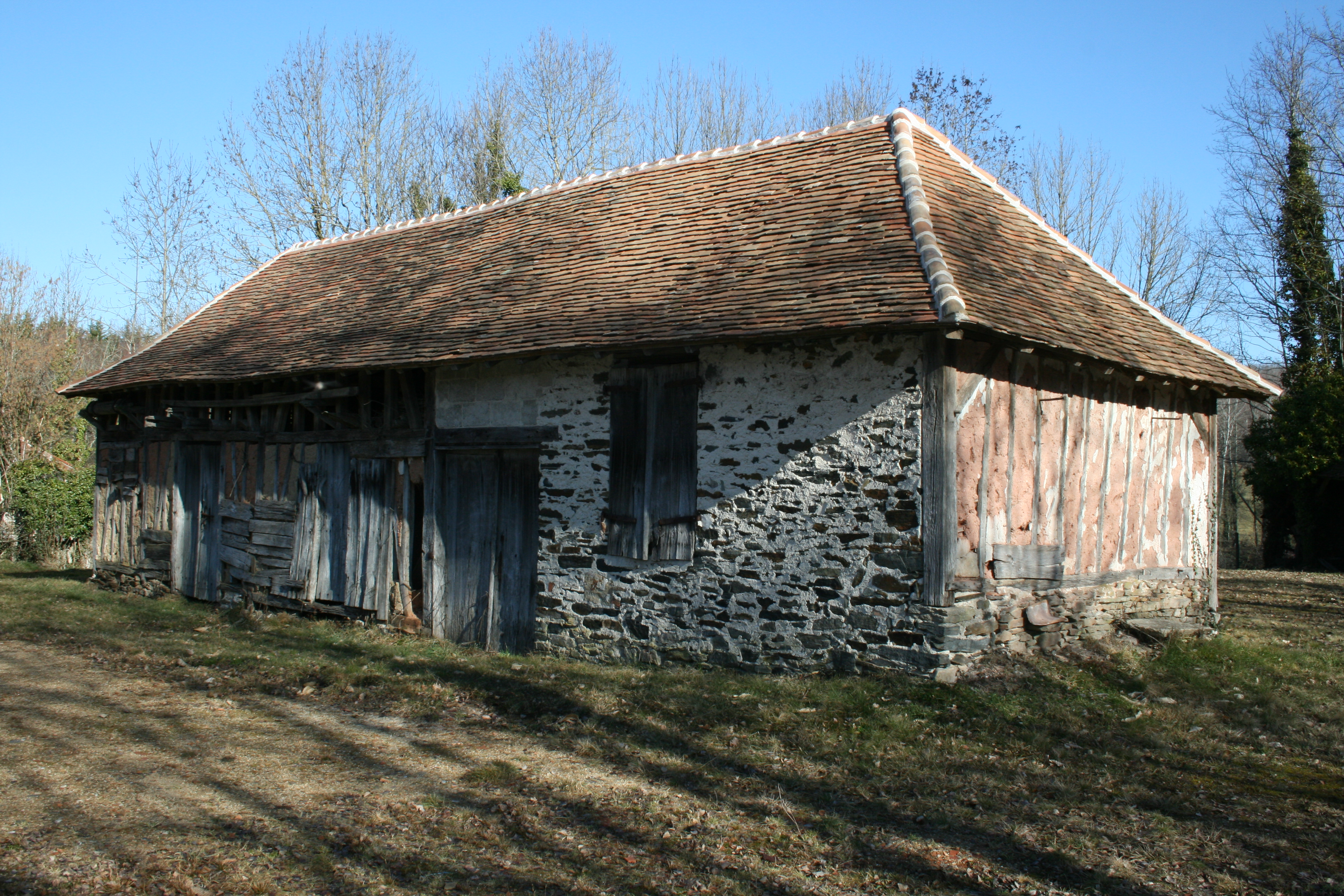 Marcognac, ancienne mine d'extraction de kaolin